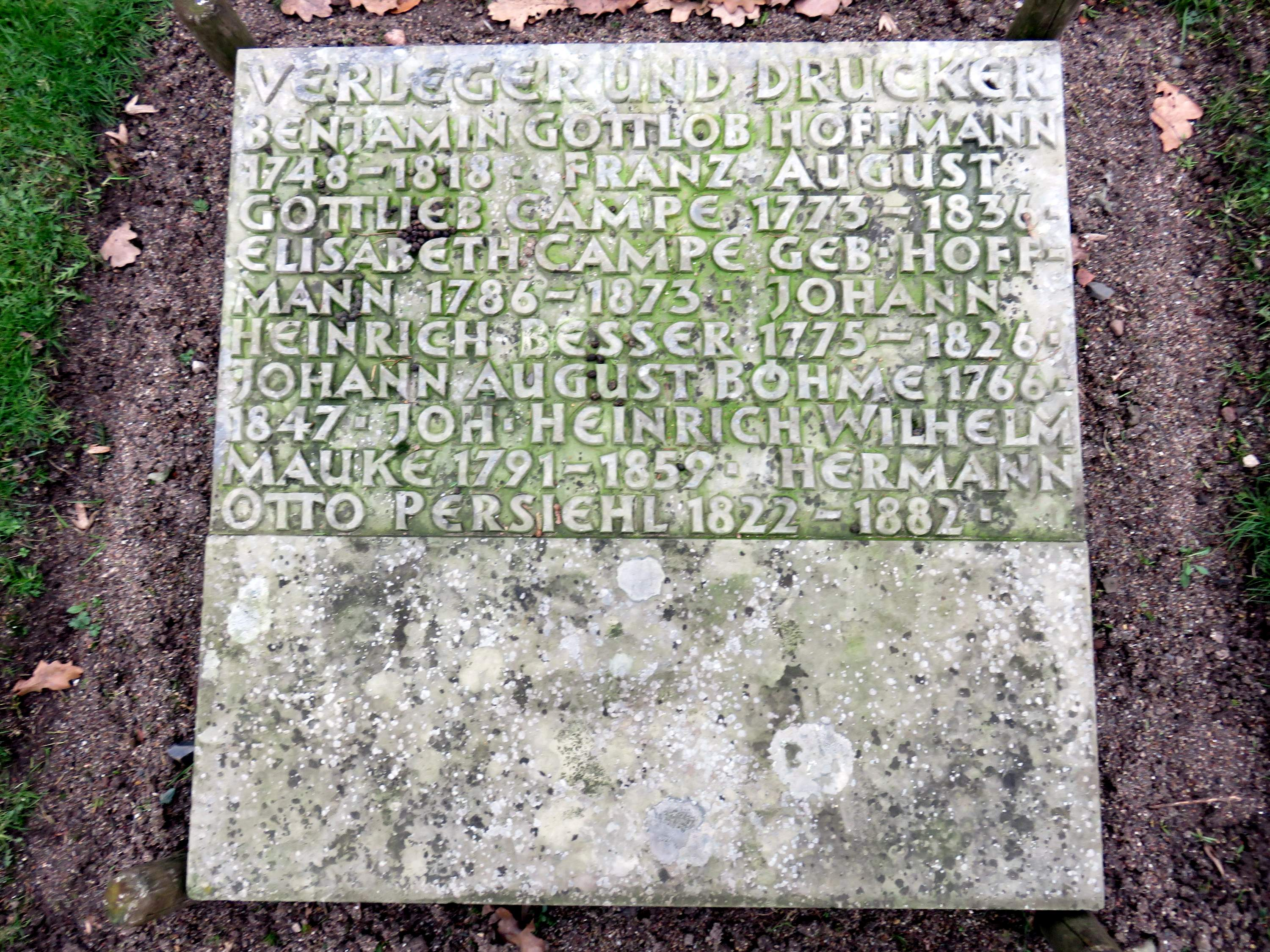 Sammelgrabmal Verleger und Drucker im Bereich des Althamburgischen Gedächtnisfriedhofs auf dem Hamburger Friedhof Ohlsdorf (Querachse nordwestliche Seite) zu Ehren von u. a. Benjamin Gottlob Hoffmann, Franz August Gottlob Campe, Johann Heinrich Besser, Johann Heinrich Wilhelm Mauke.